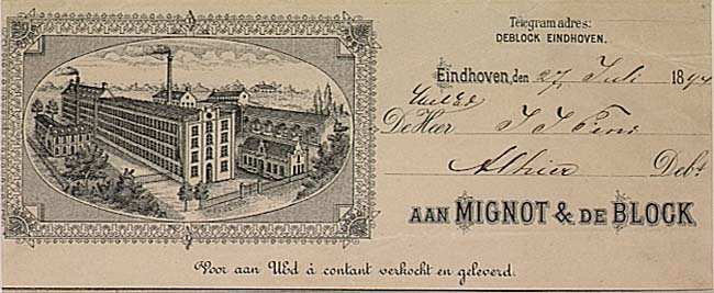 Bon van Mignot & De Block Categorie:Wikipedia:Afbeeldingen/Gebruiker:Luijt